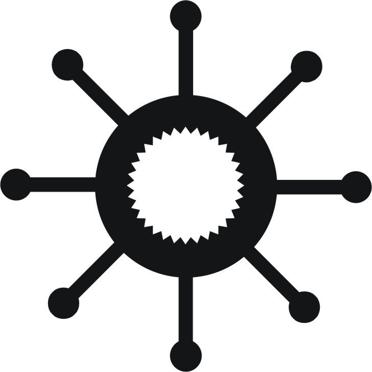 Impeller